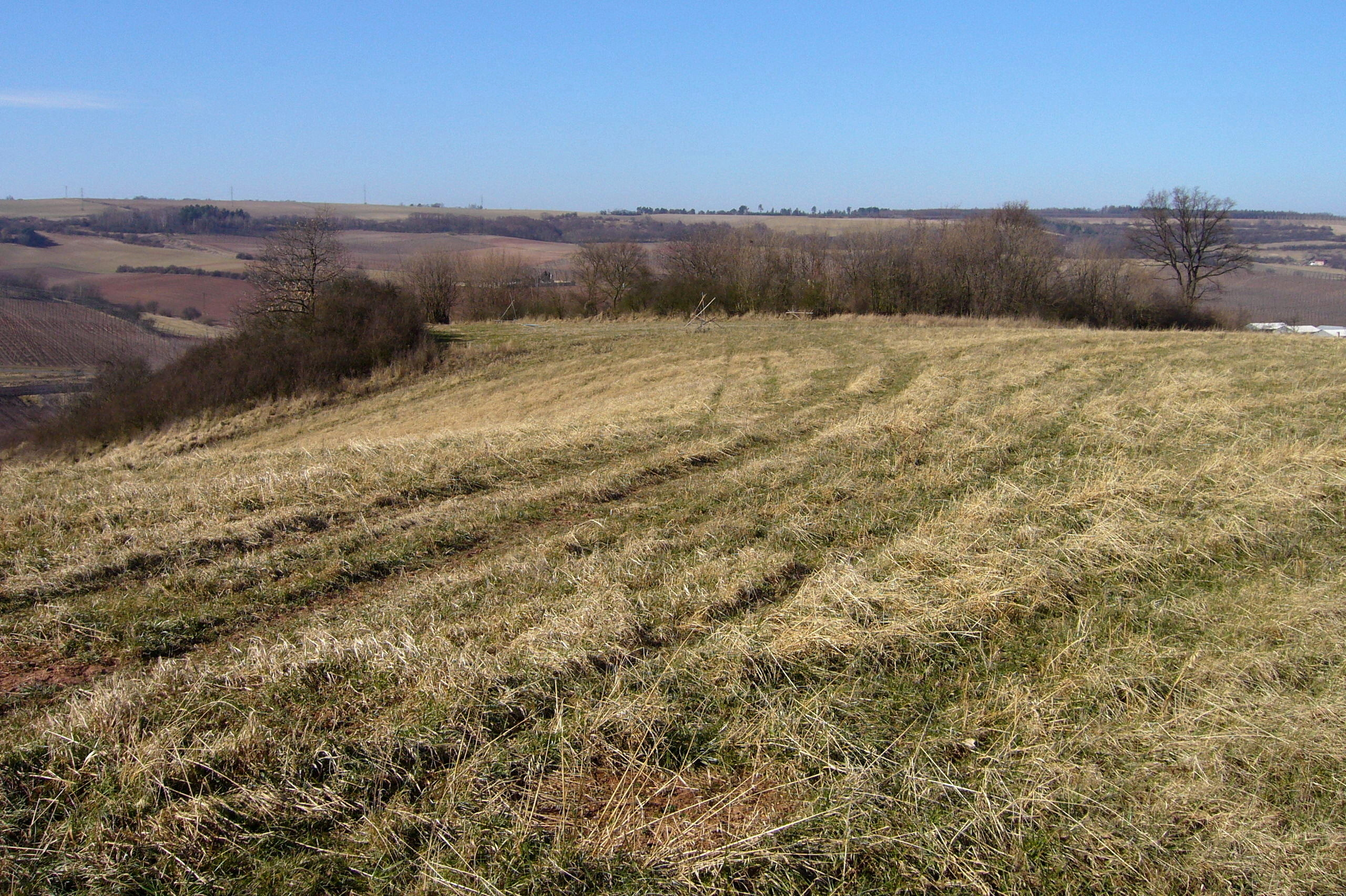 Vinařice - prostor zaniklého hradu